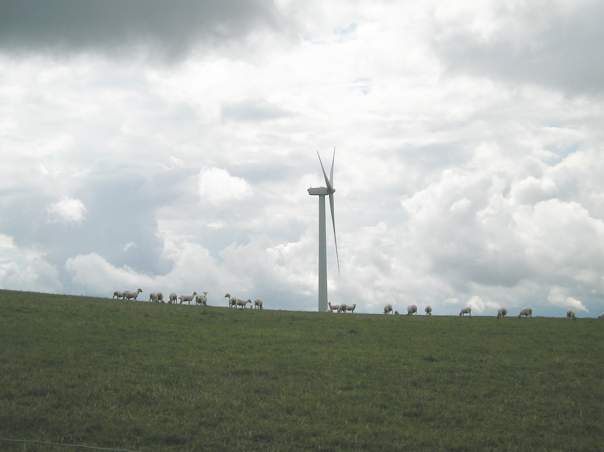 Petite image des éoliennes du plateau de millevache